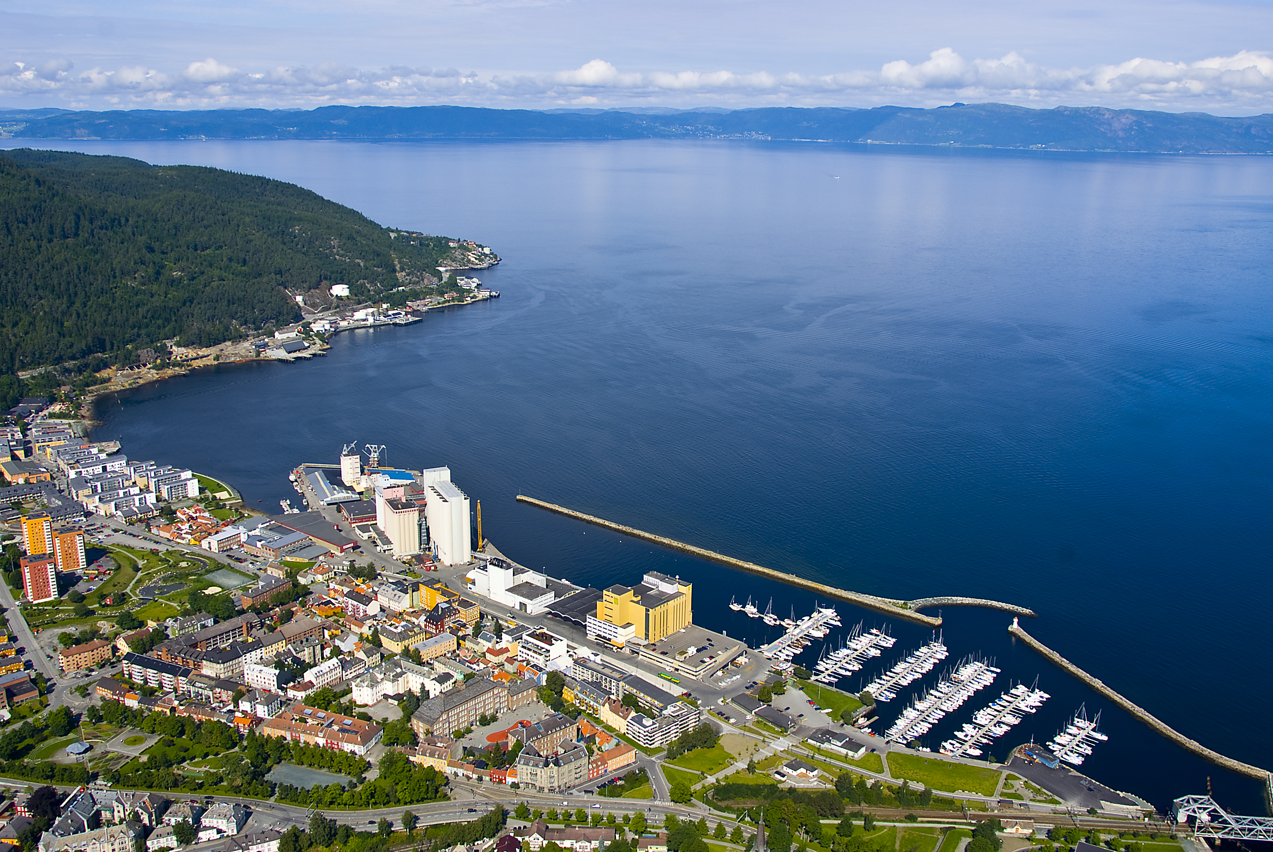 Skansen småbåthavn til høyre, Ila pir til venstre. Lengre bak ser vi Høvringen og Fagervika. Utsikt mot Fosen. Foto: Trondheim Havn/Åge Hojem.